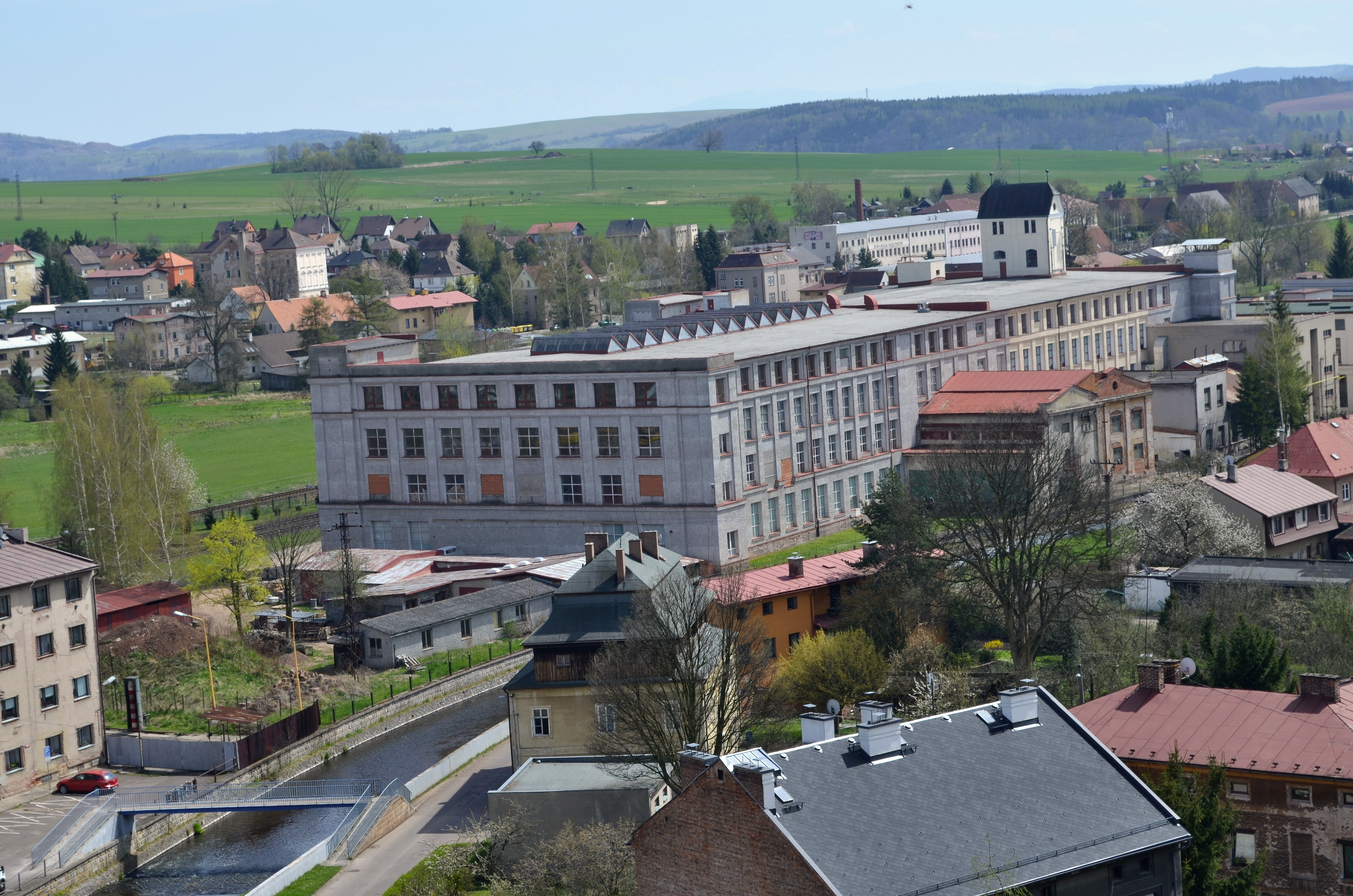 Veba Broumov a.s. z okna kláštera